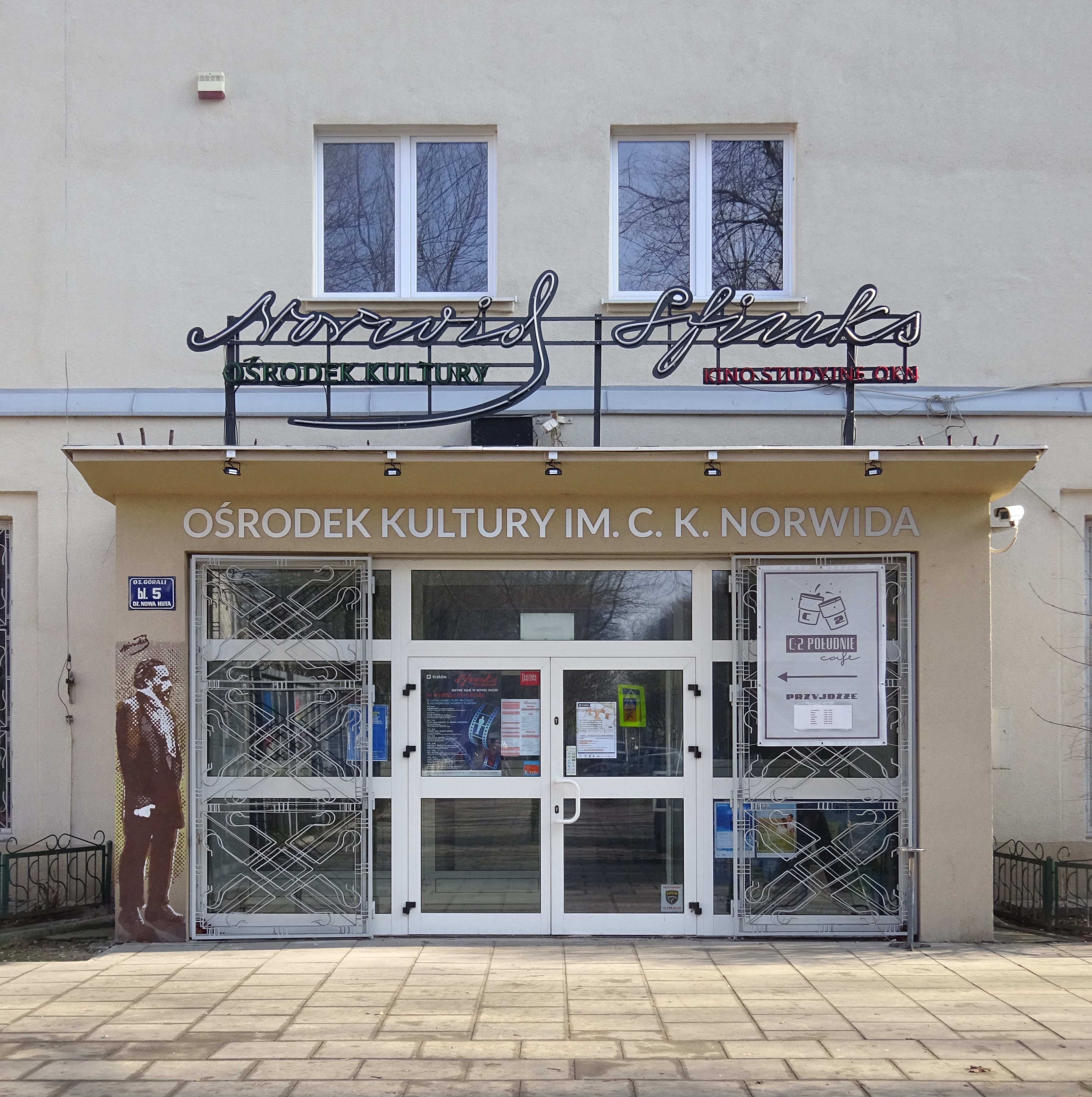 Kino Sfinks, Ośrodek Kultury im. C. K. Norwida - wejście główne w Krakowie-Nowej Hucie na Osiedlu Górali. 2018